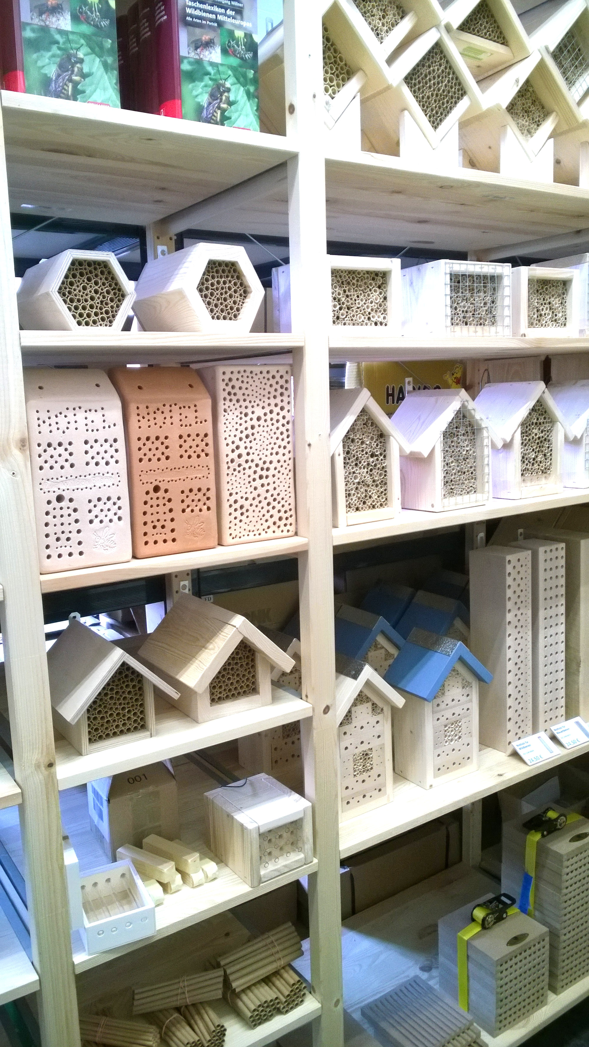 Verschiedene Insektenhotels der professionelle Bauweise im Naturschutzcenter Stuttgart.